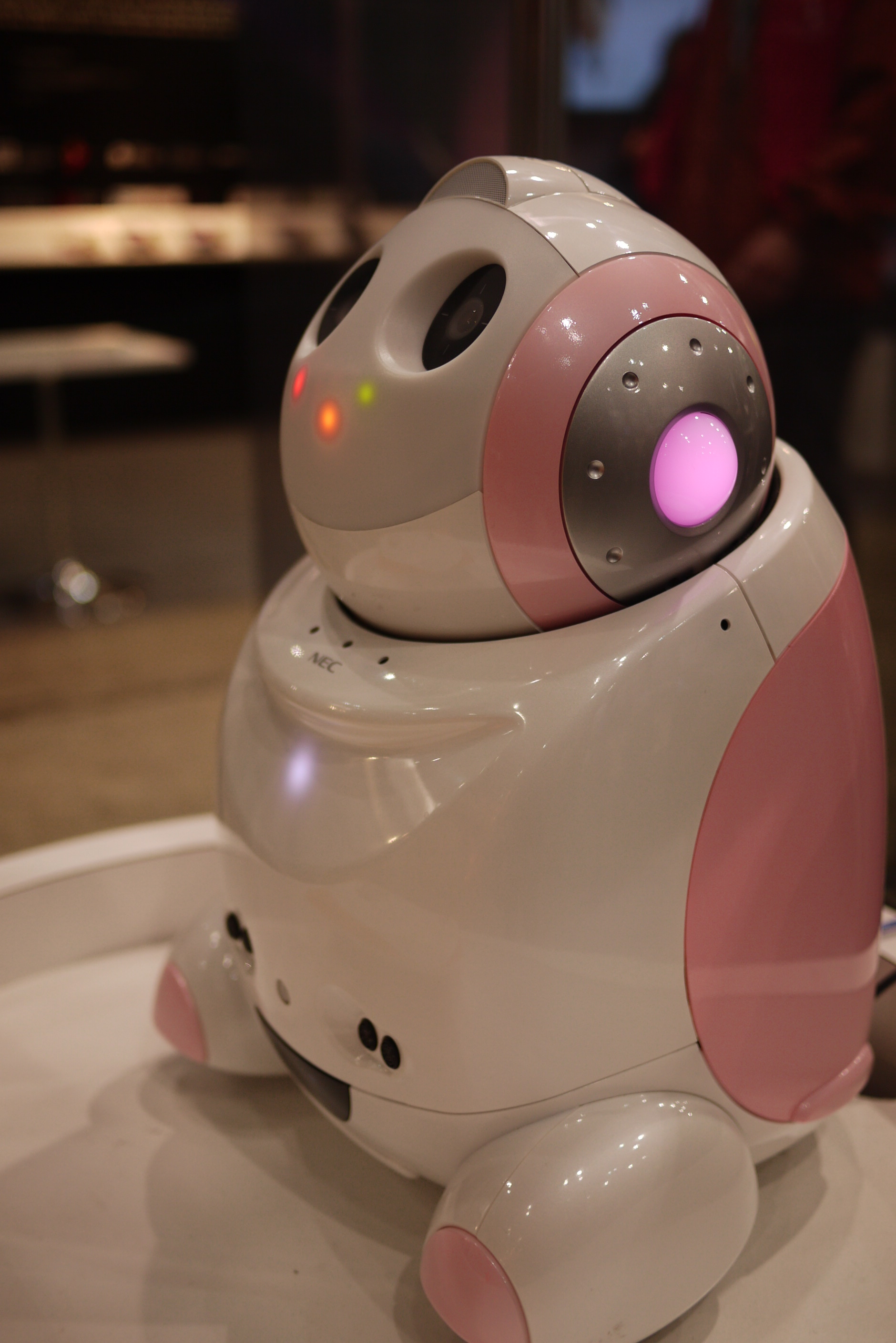 PaPeRo